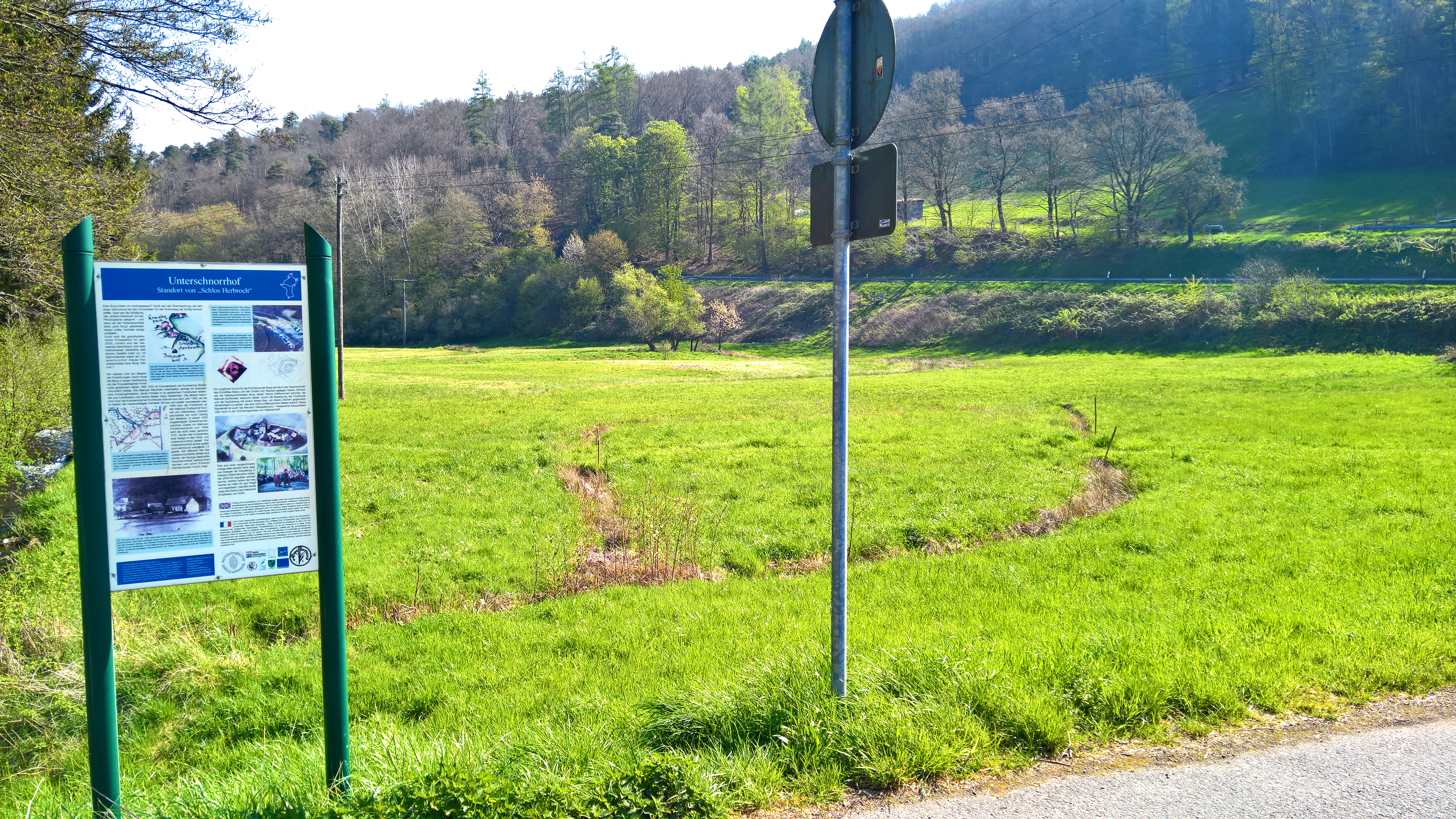 Blick von der Infotafel nach Osten zum Burgstall, sichtbar die Ablaufgräben der Wassergräben, an der kleinen Baumgruppe die Quelle